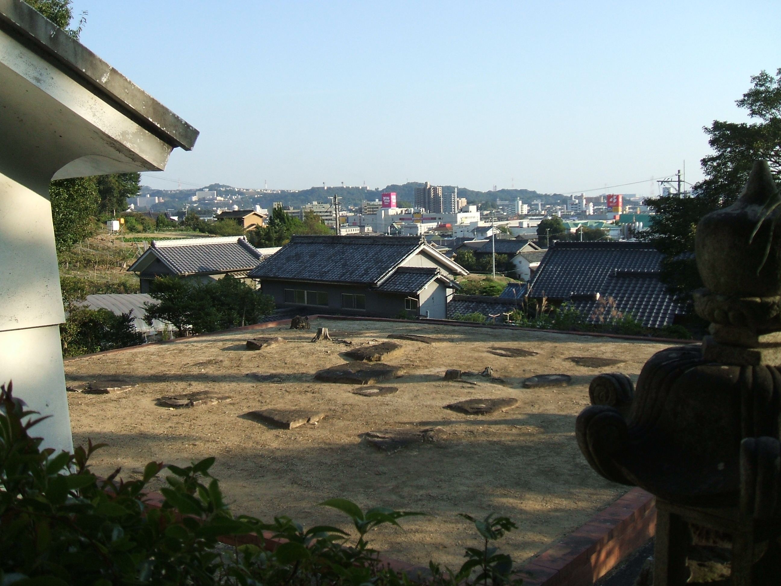 広島県福山市蔵王町にある宮の前廃寺跡